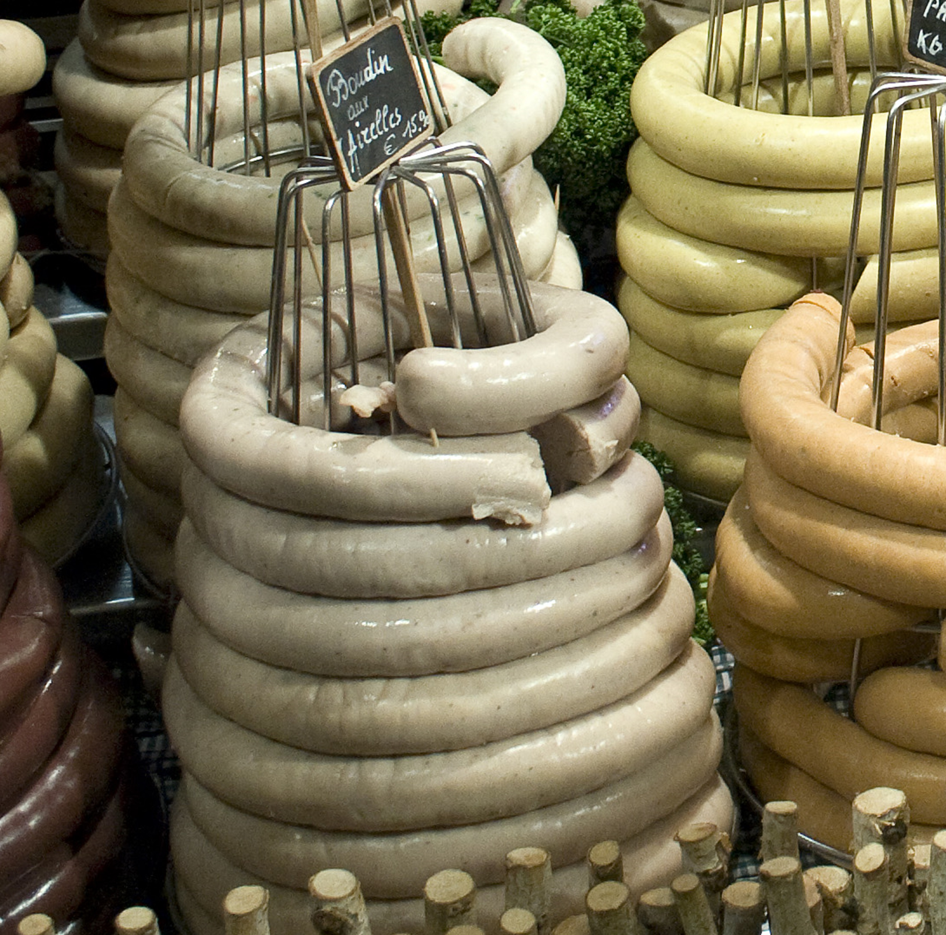 Boudin blanc aux airelles